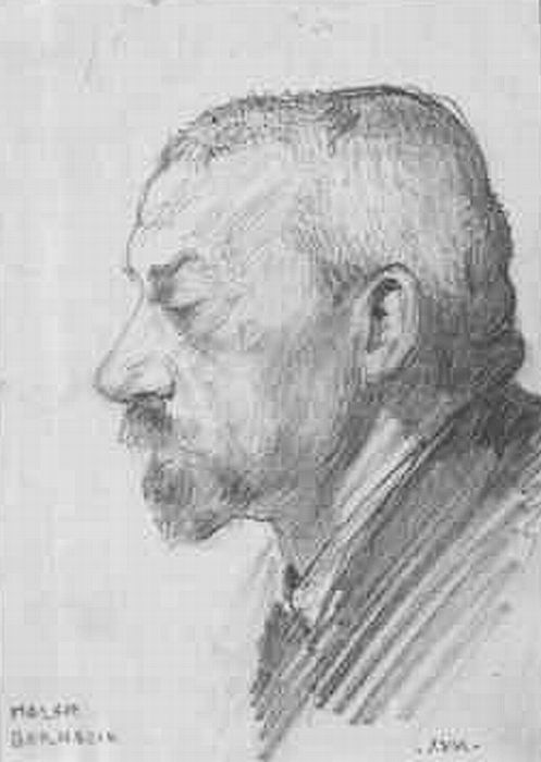 Self-portrait